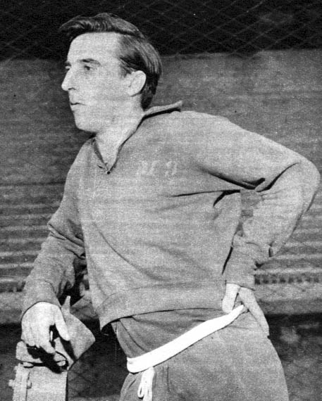 Norberto Beto Menéndez